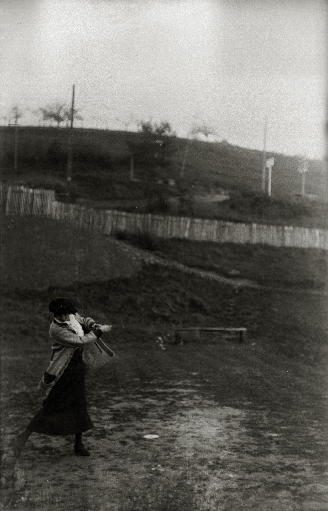 Título original: Competición de golf femenino en Lasarte (2/2) Localización: Lasarte-Oria (Guipúzcoa)